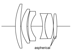 Voigtlander Nokton 50mm F1.5 Aspherical